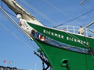 Galionsfigur der Rickmer Rickmers, Hamburg. Fotograf: Seebeer. Datum: 19.05.2005